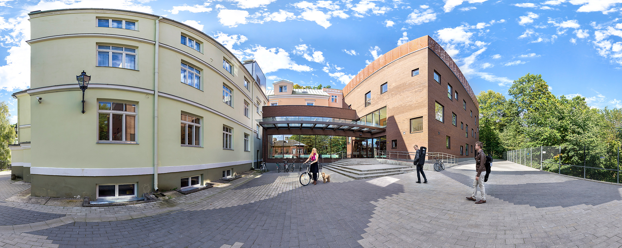 Heino Elleri Muusikakool Tartus